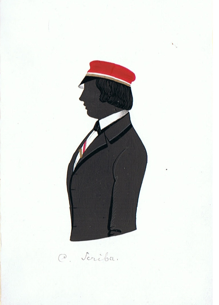 Schattenriss von Carl Scriba